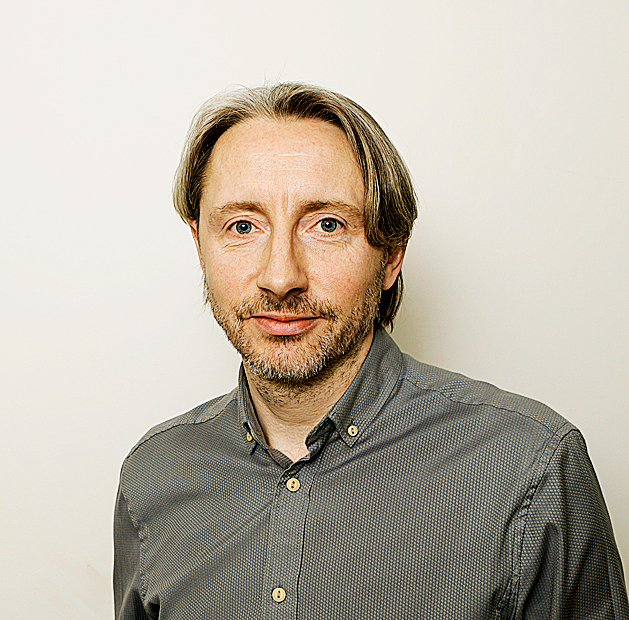 Ivar Soopan